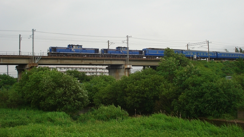 北海道・札幌市南区・清田区・厚別区・白石区・江別市を流れる厚別川。JR千歳線の橋を特急「北斗星」がわたる。